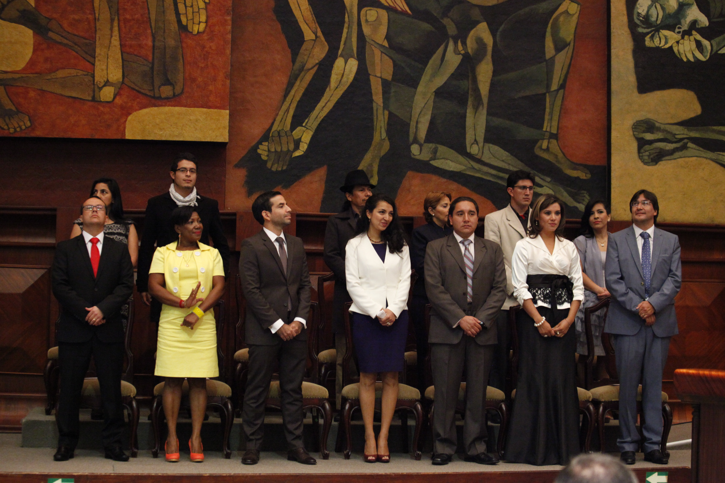 Condecoración Asamblea Nacional República del Ecuador, "VICENTE ROCAFUERTE", al Mérito Social, al Sacerdote Antonio Polo Frattin; Condecoración Asamblea Nacional República del Ecuador, "VICENTE ROCAFUERTE", al Mérito Social y Educativo, al Dr. Carlos Leopoldo Mosquera Sánchez; Condecoración Asamblea Nacional República del Ecuador , "VICENTE ROCAFUERTE", al Mérito Social, a la Fundación Operación Sonrisa Ecuador; Posesión de los Consejeros y Consejeras Principales y Suplentes del Consejo de Participación Ciudadana y Control Social; y, Primer Debate del Proyecto de Ley Reformatoria del Código Orgánico de Organización Territorial, Autonomía y Descentralización, COOTAD.